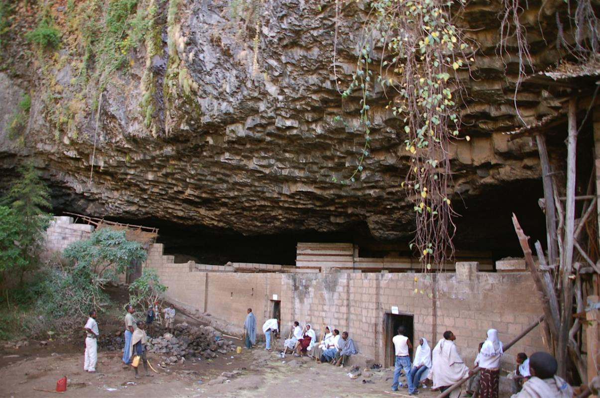 Eglise Yemrehanna Krestos